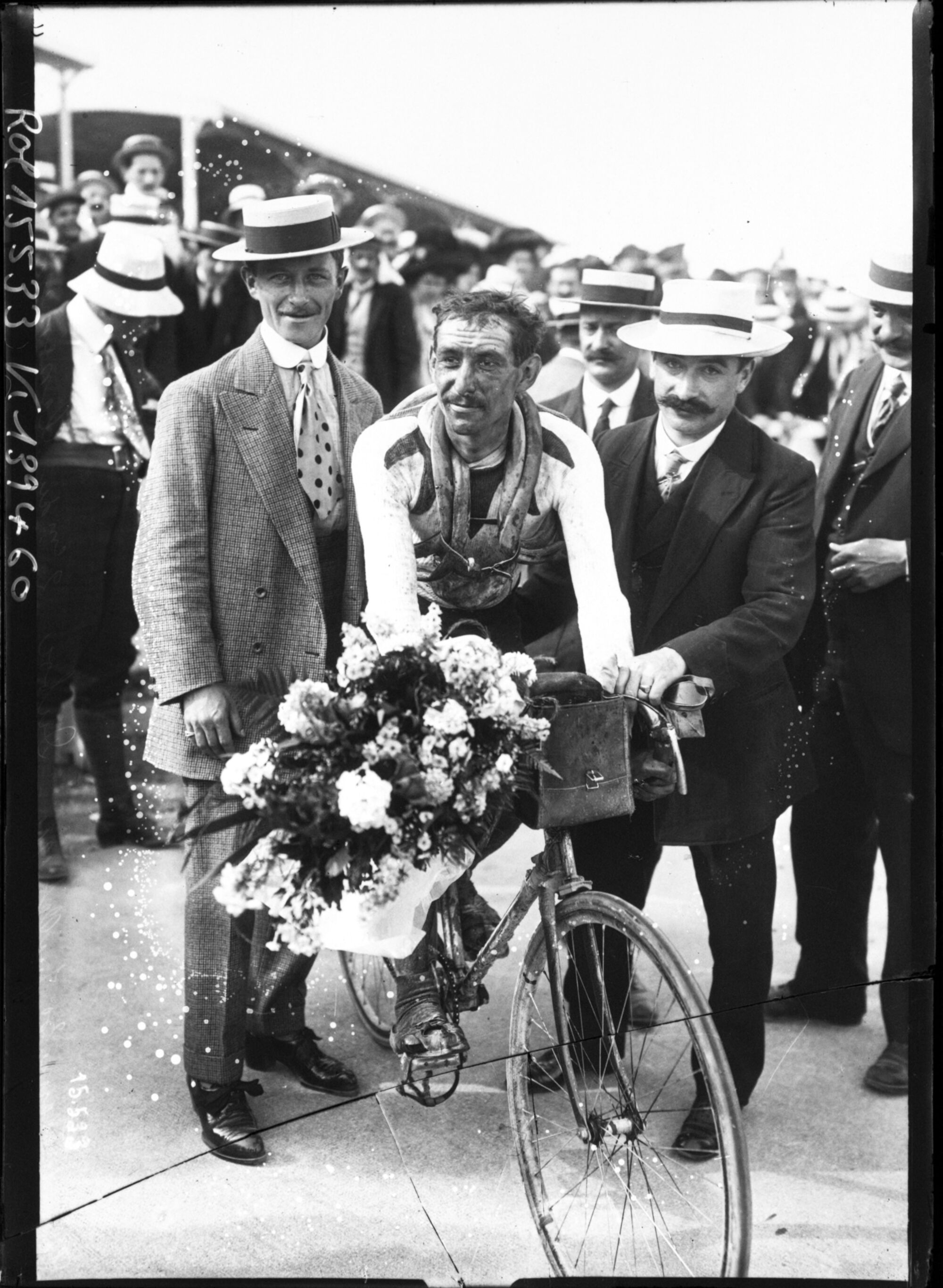 Tour de France, 30 juillet 1911, Duboc 2e du classement